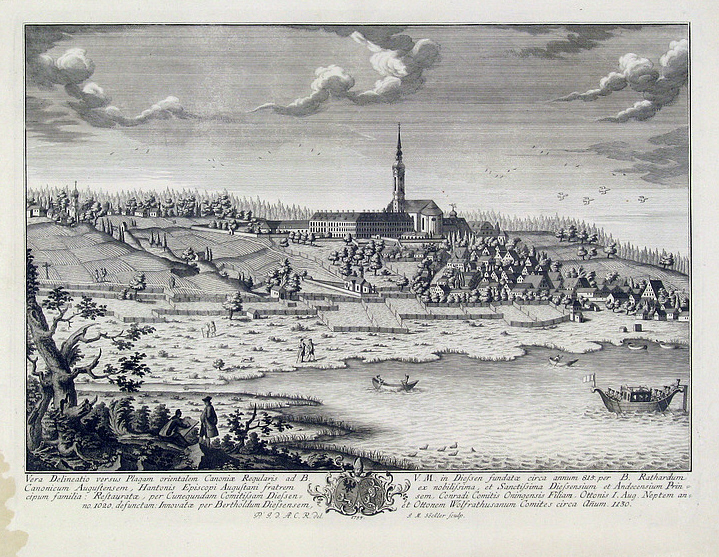 "Vera delineatio versus plagam orientalem Canoniae Regularis ad B. V. M. in Diessen". Kupferstich von J. M. Söckler 1755. 26 x 39 cm.